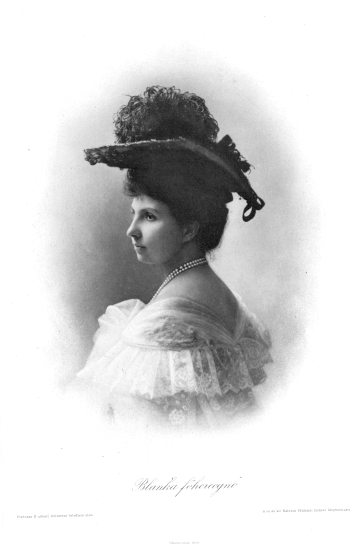 Blanka von Castilien, Prinzessin von Bourbon.